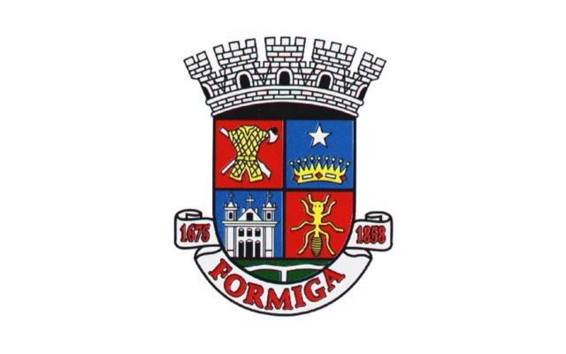 Bandeira da cidade de Formiga no Estado de Minas Gerais